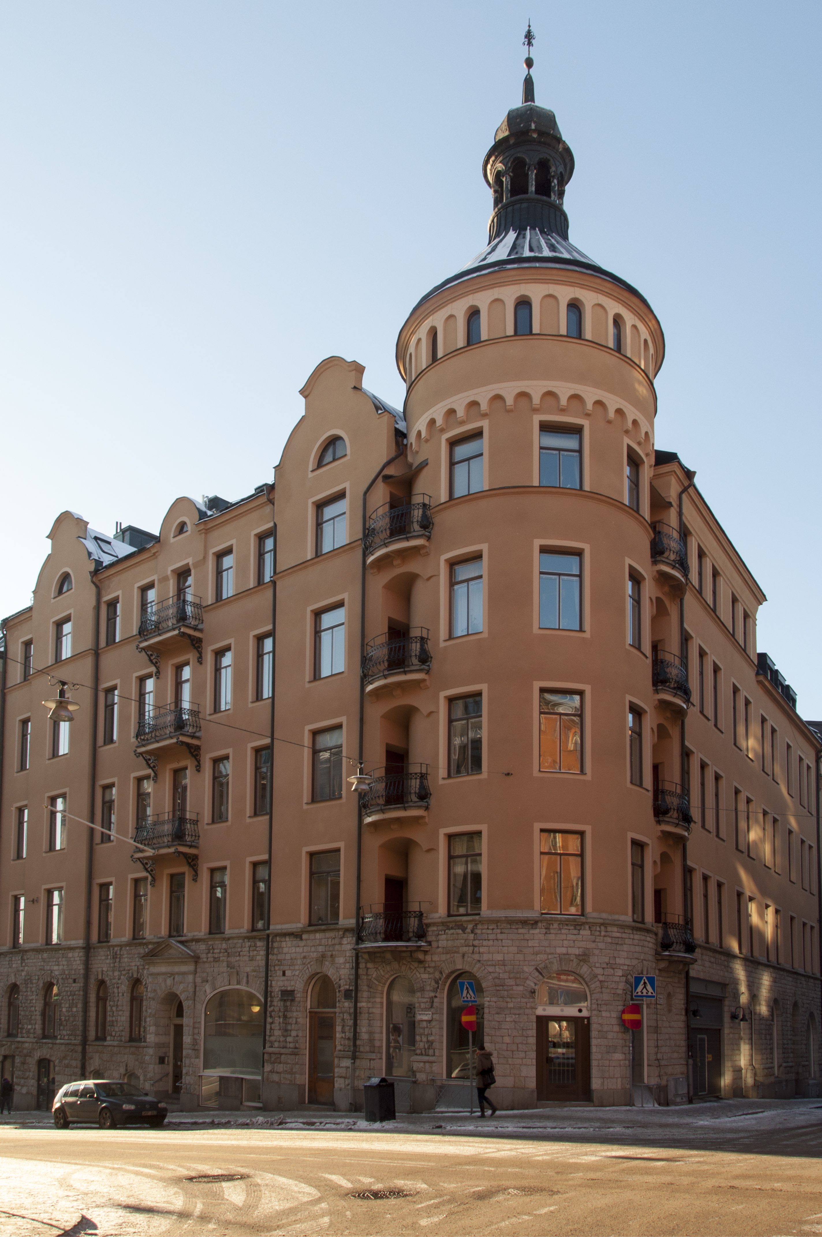 Skolan 3, Upplandsgatan 3, Wallingatan 2, Nybyggnadsår 1897 - 1899, A. Dahlström (Byggherre) A. H. Ekström (Byggherre) C. F. Frantzén (Byggmästare) Erik Otto Ulrich (Arkitekt) O. J. Westerberg (Byggherre) Olof Knutsson Hellström (Byggmästare)